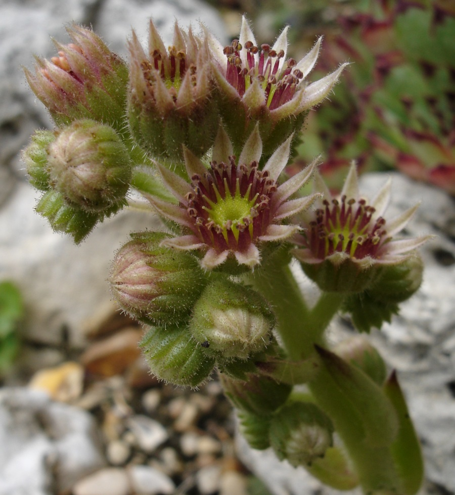 Sempervirum calcareum, Jardin alpin, Jardin des Plantes de Paris